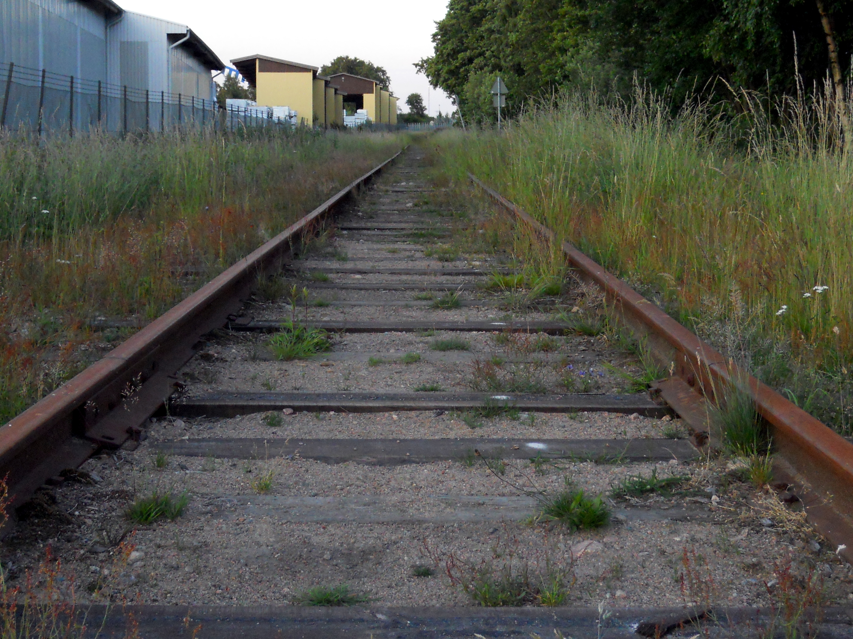 Resterna av Varberg-Ätrans järnväg som industrispår i Varberg.